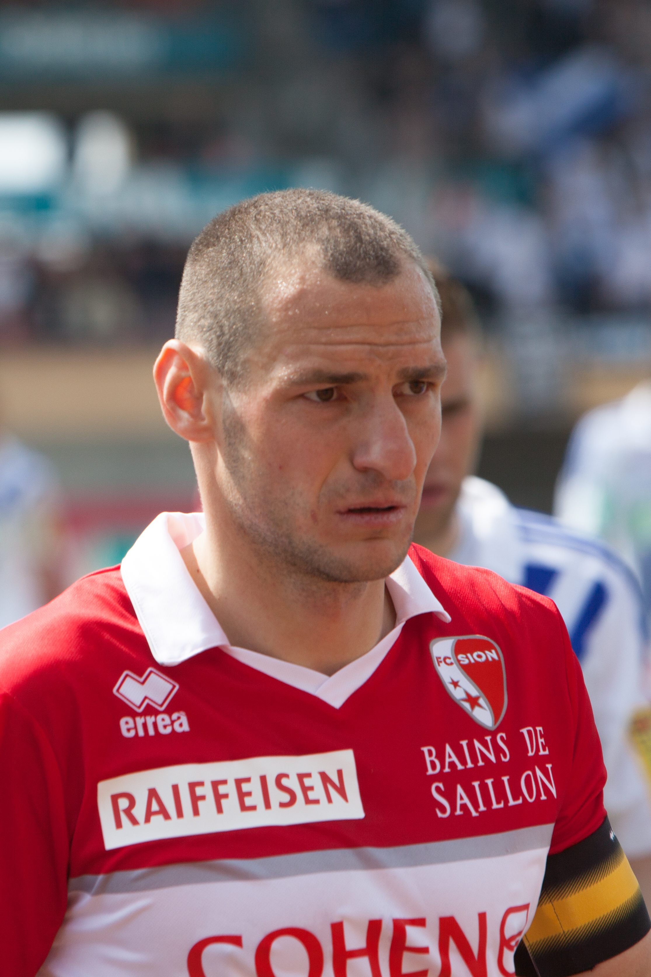 Lausanne Sport vs FC Sion - Avril 2014 - Vilmos Vanczak